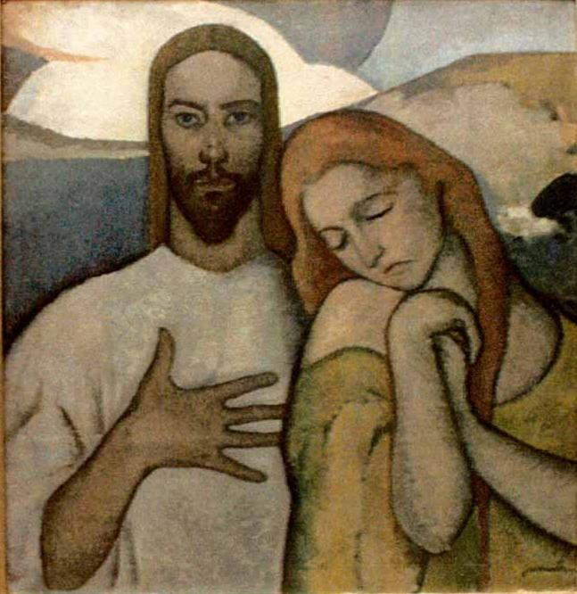 Triptic religios - Muzeul Naţional de Artă din Bucureşti, ulei pe carton, 1925